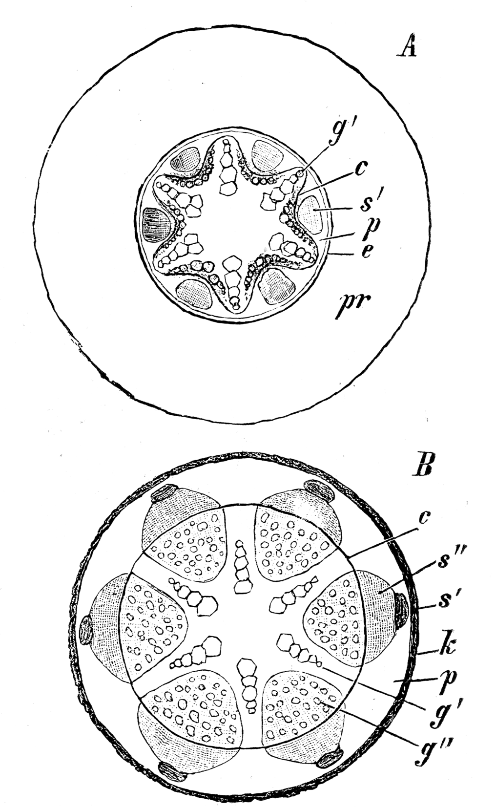 secondary growth of a root of a dicot/Sekundäres Dickenwachstum einer Wurzel bei Dikotylen; A beginnend, B fortgeschritten; pr primäre Rinde, e Endodermis, c Cambiumring, g' primäres Xylem, s' primäres Phloem, p Perizykel, g" secundäres Holz, s" sekundärer Bast, k Periderm